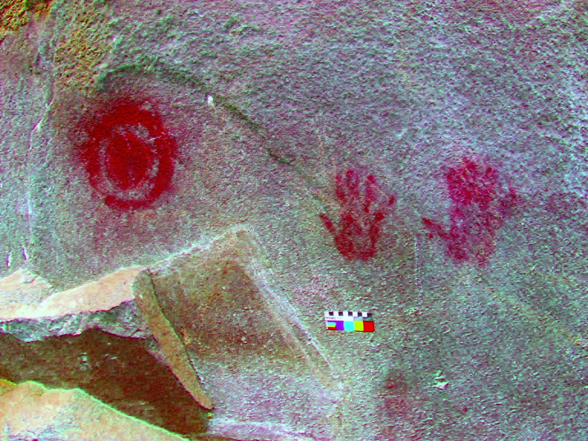 Fotografía de pinturas rupestres, dos manos y círculos concéntricos, filtrada por DStretch, filtro yrd